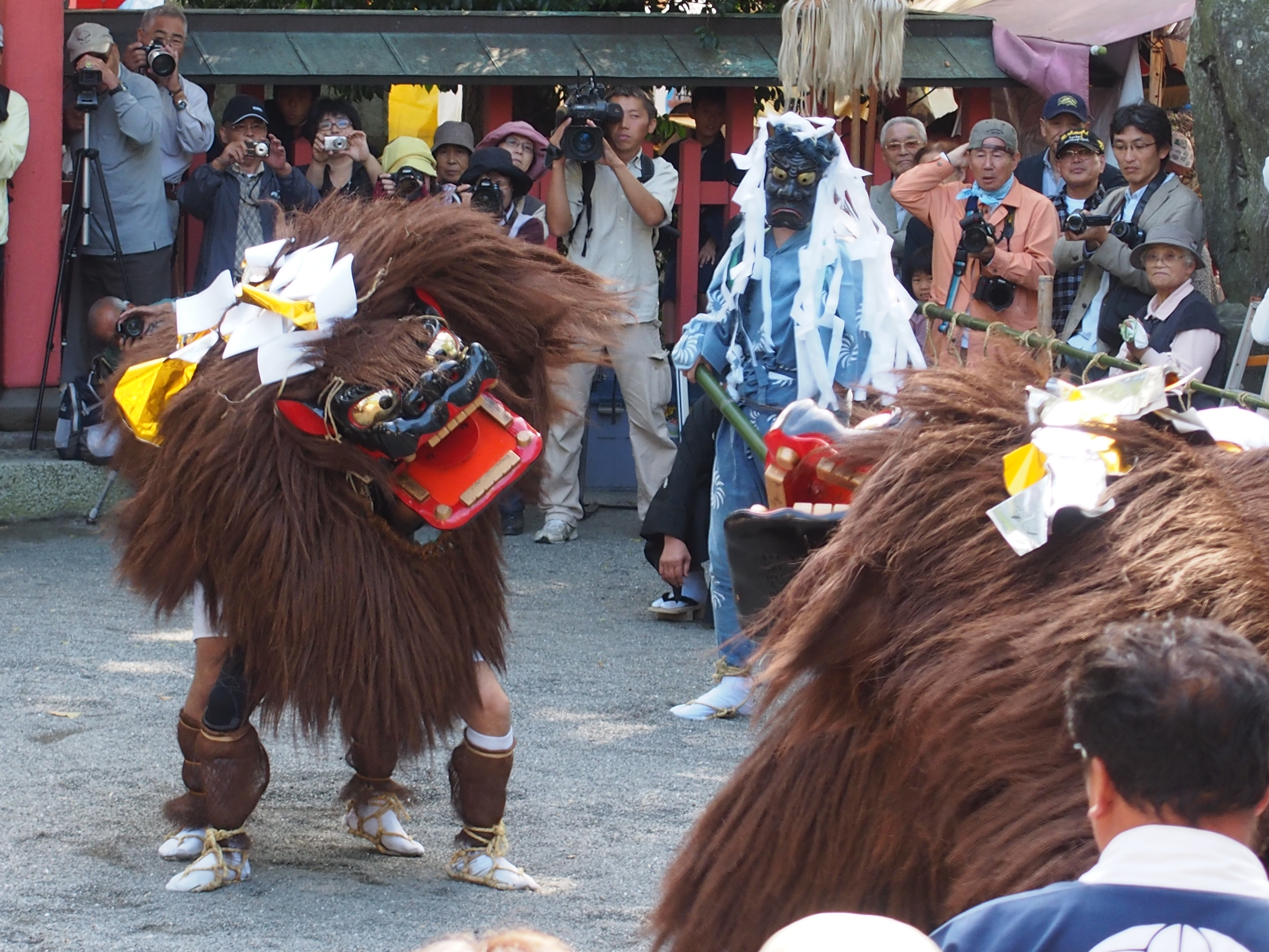 蜷城の獅子舞です。